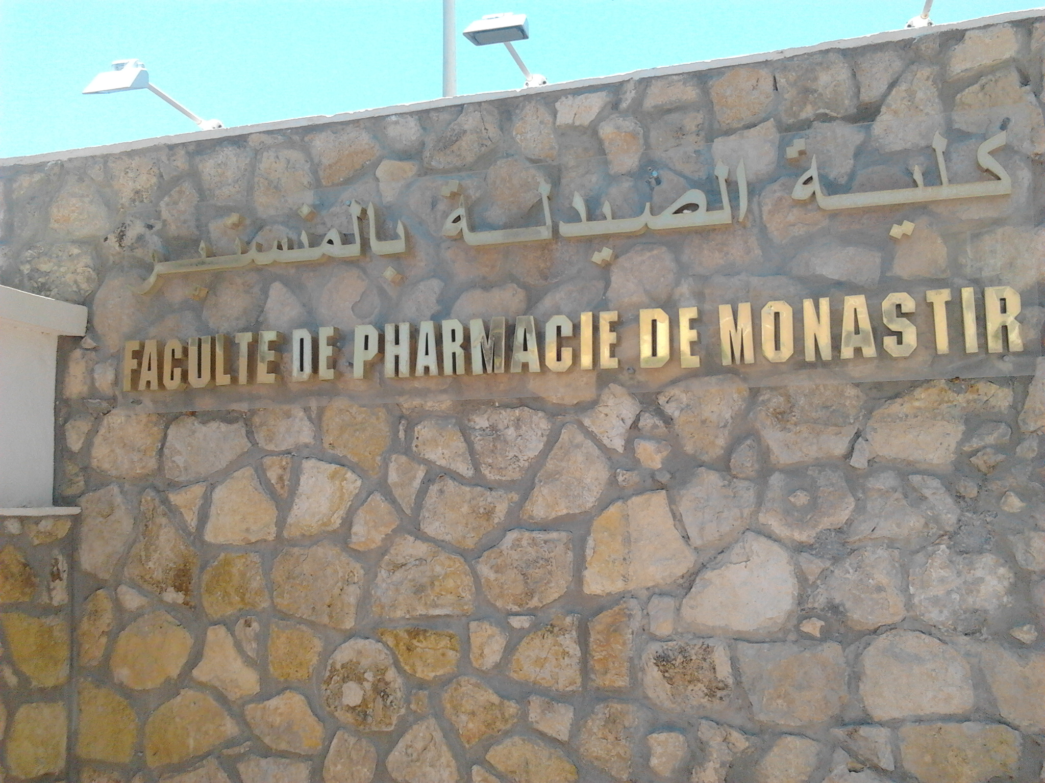 Faculté de pharmacie de Monastir